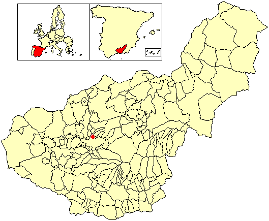 Situación de la localidad de Pulianillas (en el municipio de Pulianas) respecto a la provincia de Granada, en España.